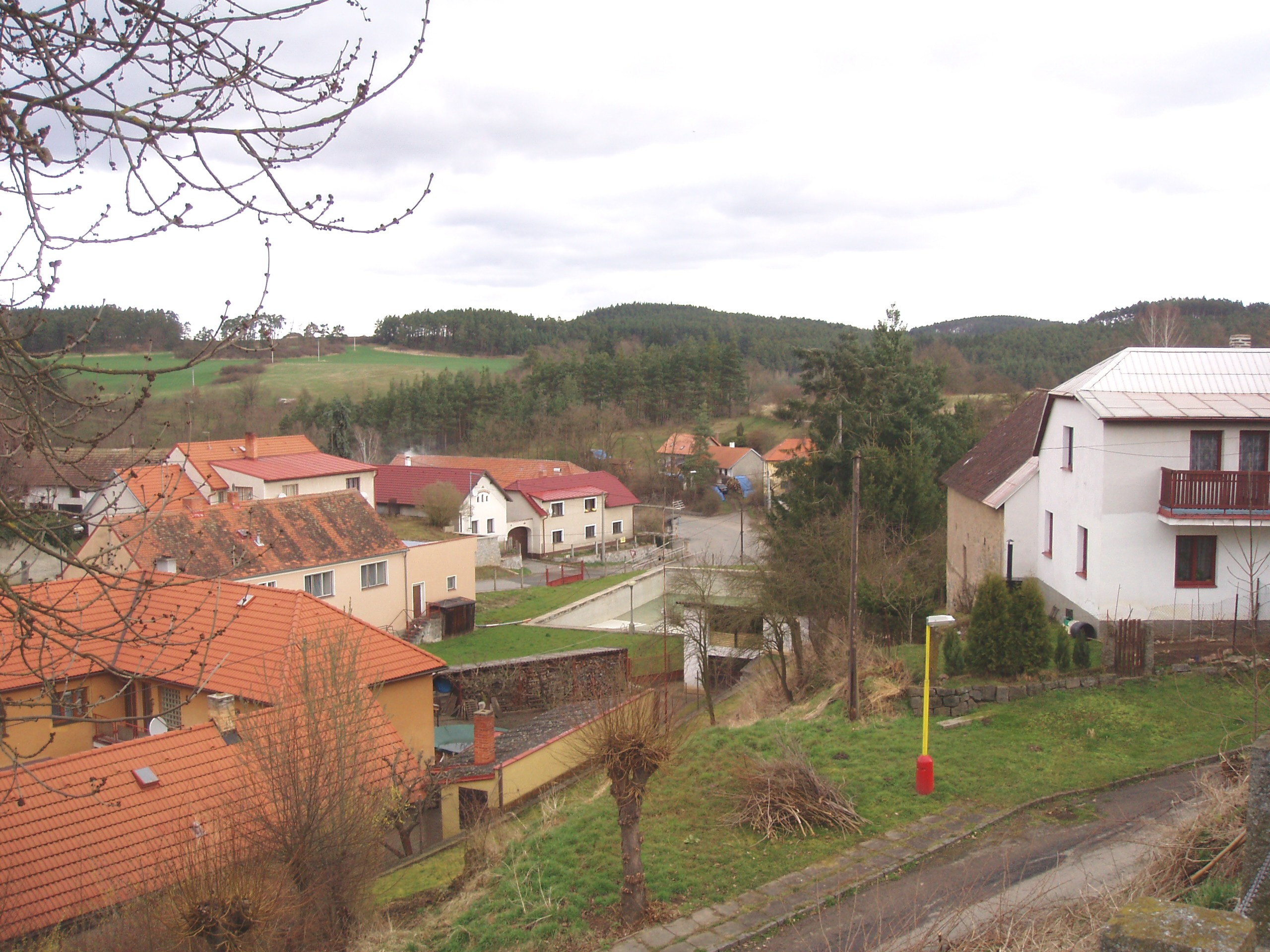 Hrachov malá víska ve středním Povltaví